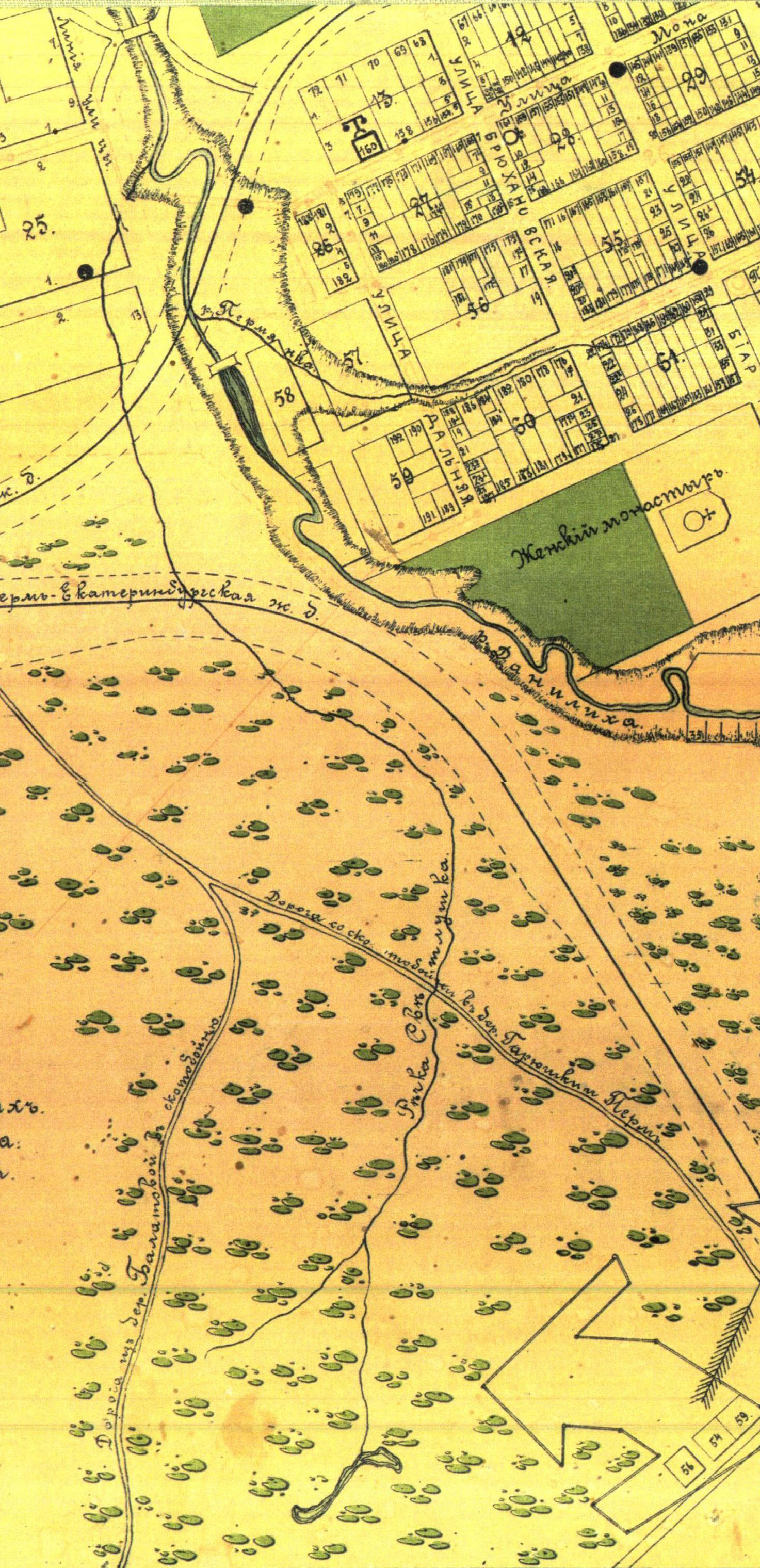 Река Светлушка на плане Перми 1908 года